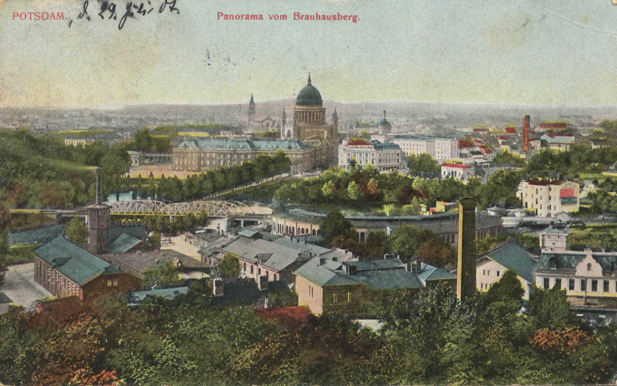 Stadtansicht vom Brauhausberg